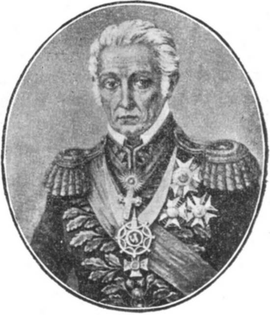 Marechal Joaquim Xavier Curado